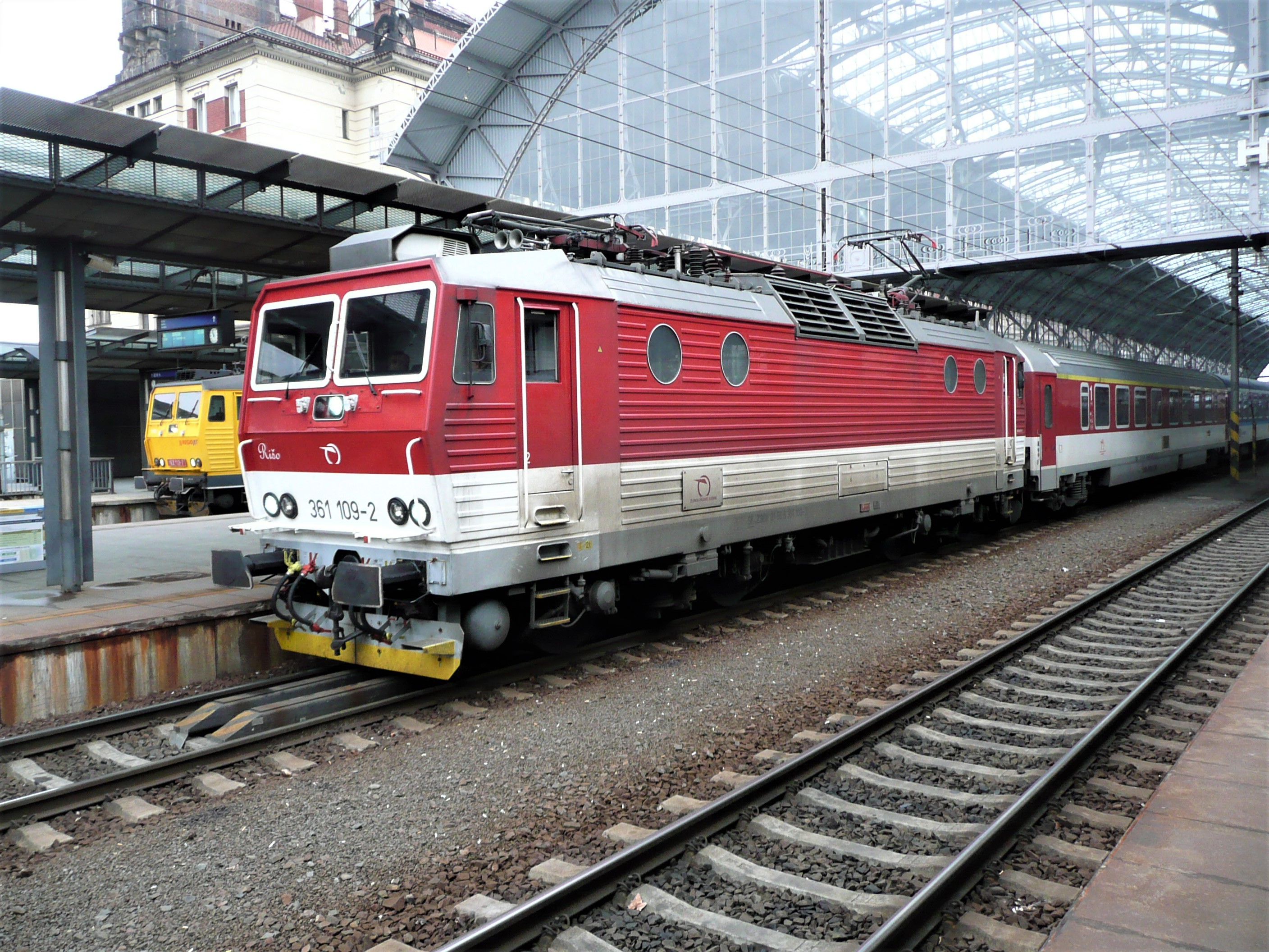 361 109 der ZSSK in Prag Hln